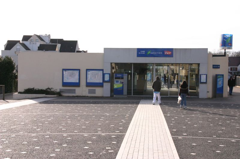 Gare de Le Mée